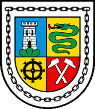 Armoiries de la commune de Saint-Sulpice. Auteur : Gérard Crameri